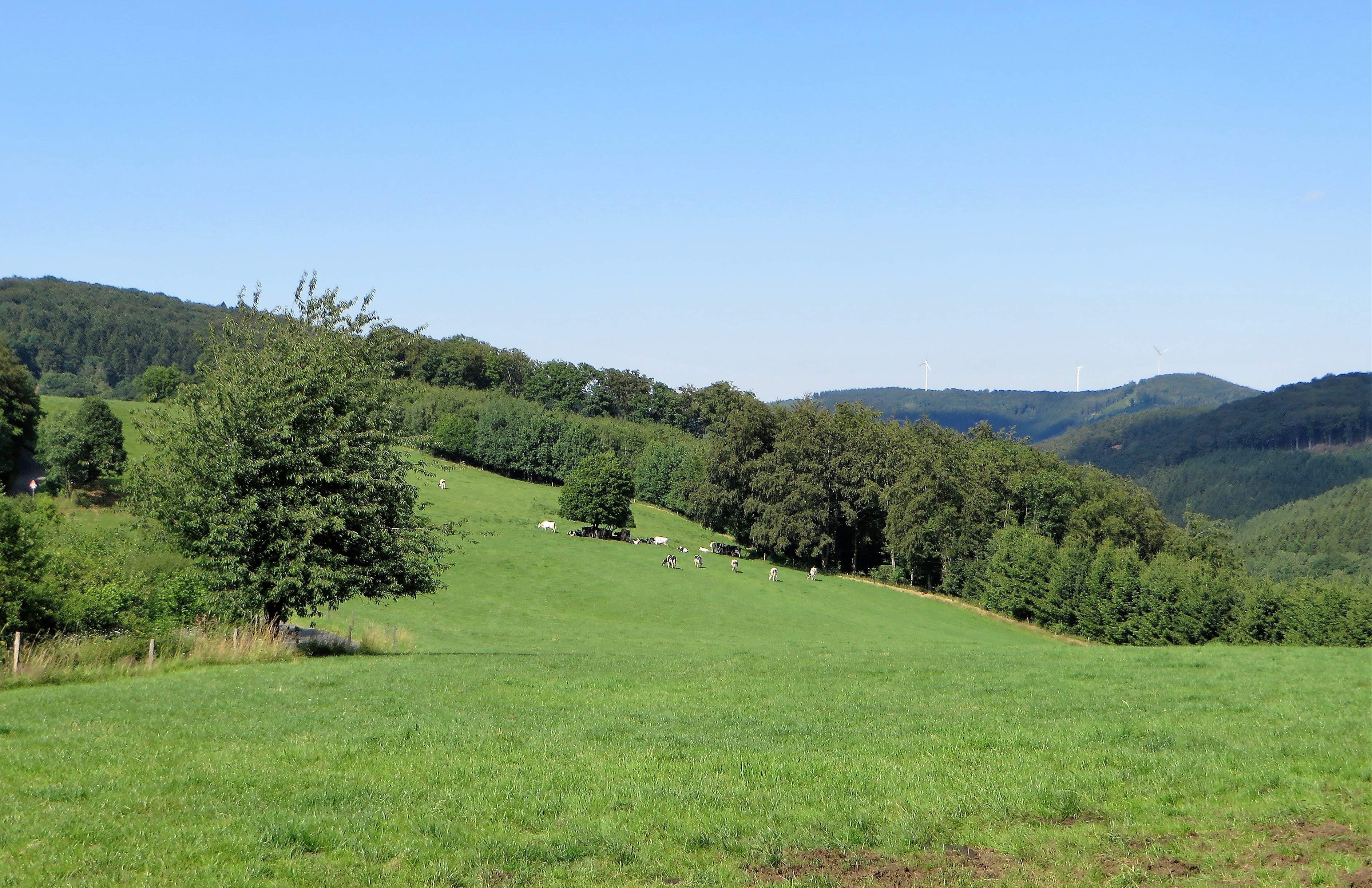 Landschaftsschutzgebiet „Deipenbrink“ in Hagen. Es handelt sich im wesentlichen um Waldbestände, die von zahlreichen Bachläufen, mit einer artenreichen Fauna und Flora, durchzogen sind. Auf dem Foto links sieht man östlich der Sauerlandlinie (A 45) die Straße nach Deipenbrink, rechts oberhalb des Nimmertales den Hobräcker Rücken.